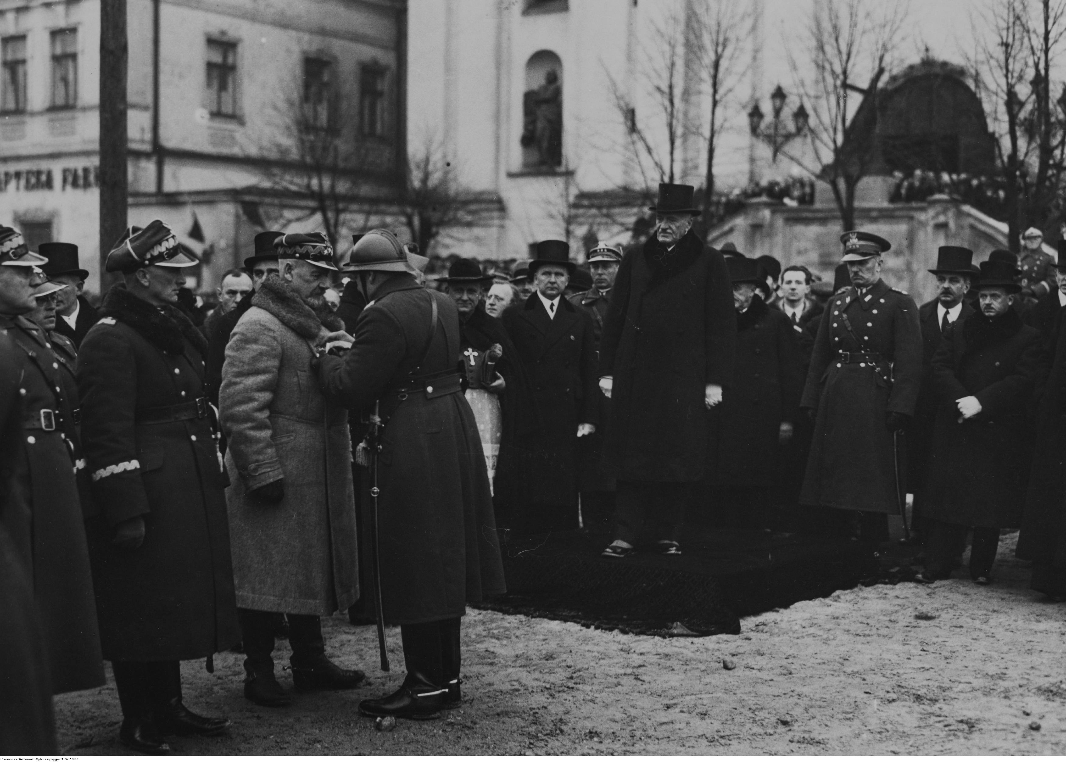 15-lecie 81 Pułku Strzelców Grodzieńskich im. króla Stefana Batorego w Grodnie. Dowódca pułku dekoruje odznaką gen. Lucjana Żeligowskiego. Widoczni także m.in. prezydent Ignacy Mościcki (z przodu na podwyższeniu), płk Jan Głogowski (4. z prawej), wojewoda Marian Zyndram Kościałkowski (2. z prawej). Widoczni także m.in.: Emil Kaliński (na lewo od prezydenta) i adiutant prezydenta RP kpt. Zygmunt Gużewski (na lewo za prezydentem). Koncern Ilustrowany Kurier Codzienny - Archiwum Ilustracji. Sygnatura: 1-W-1306